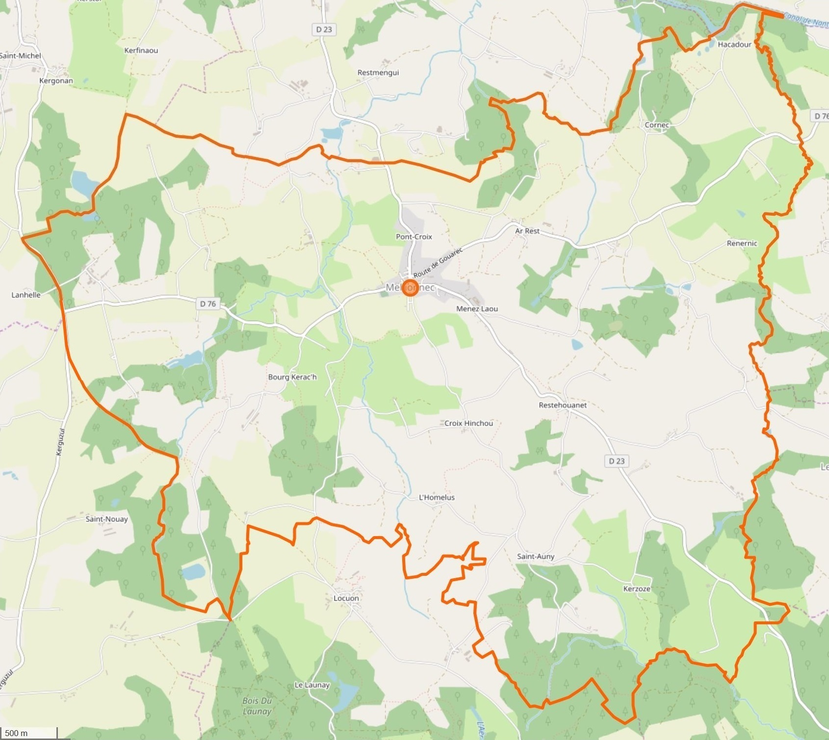 Cette carte a été créée à partir des données du site Openstreetmap. This map may be incomplete, and may contain errors. Don't rely solely on it for navigation.